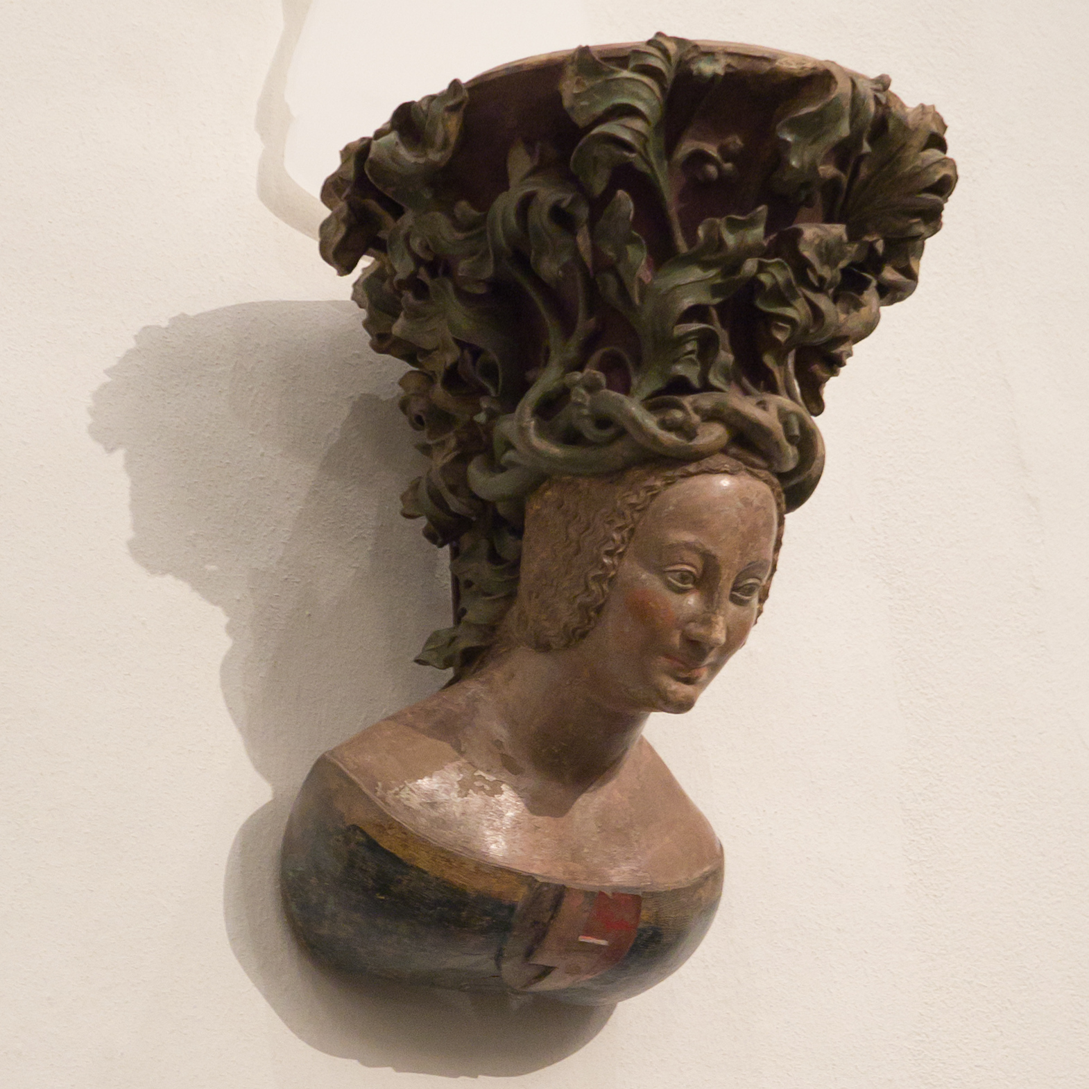 Museum Schnütgen, Wilder Mann Inv. Nr. A47 und Parlerbüste Inv. Nr. K 127